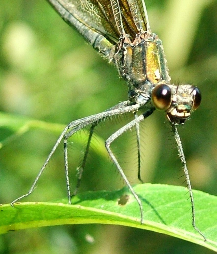 Blaufluegel-Prachtlibelle-Weibchen